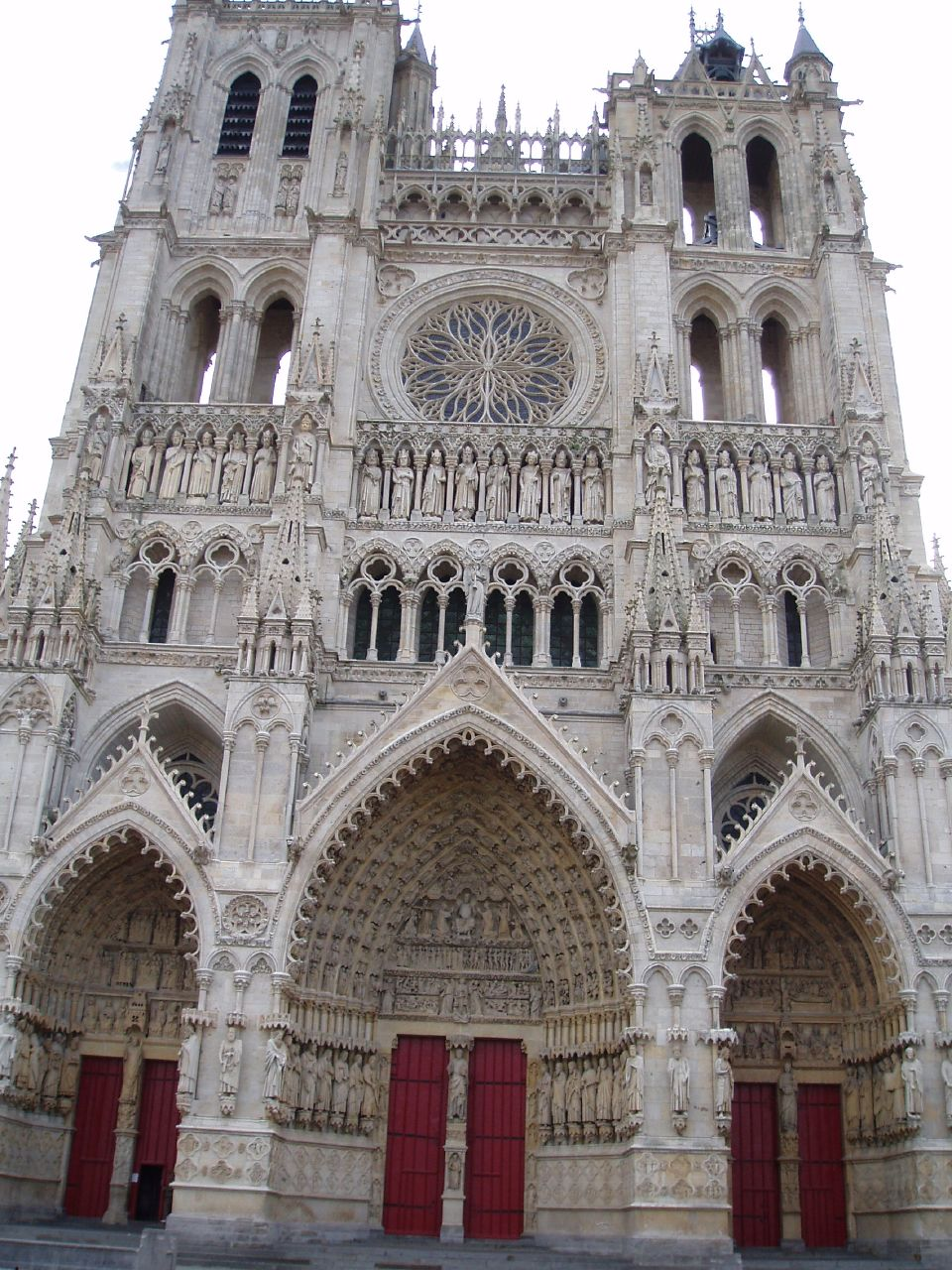 Amiens (Somme, France)